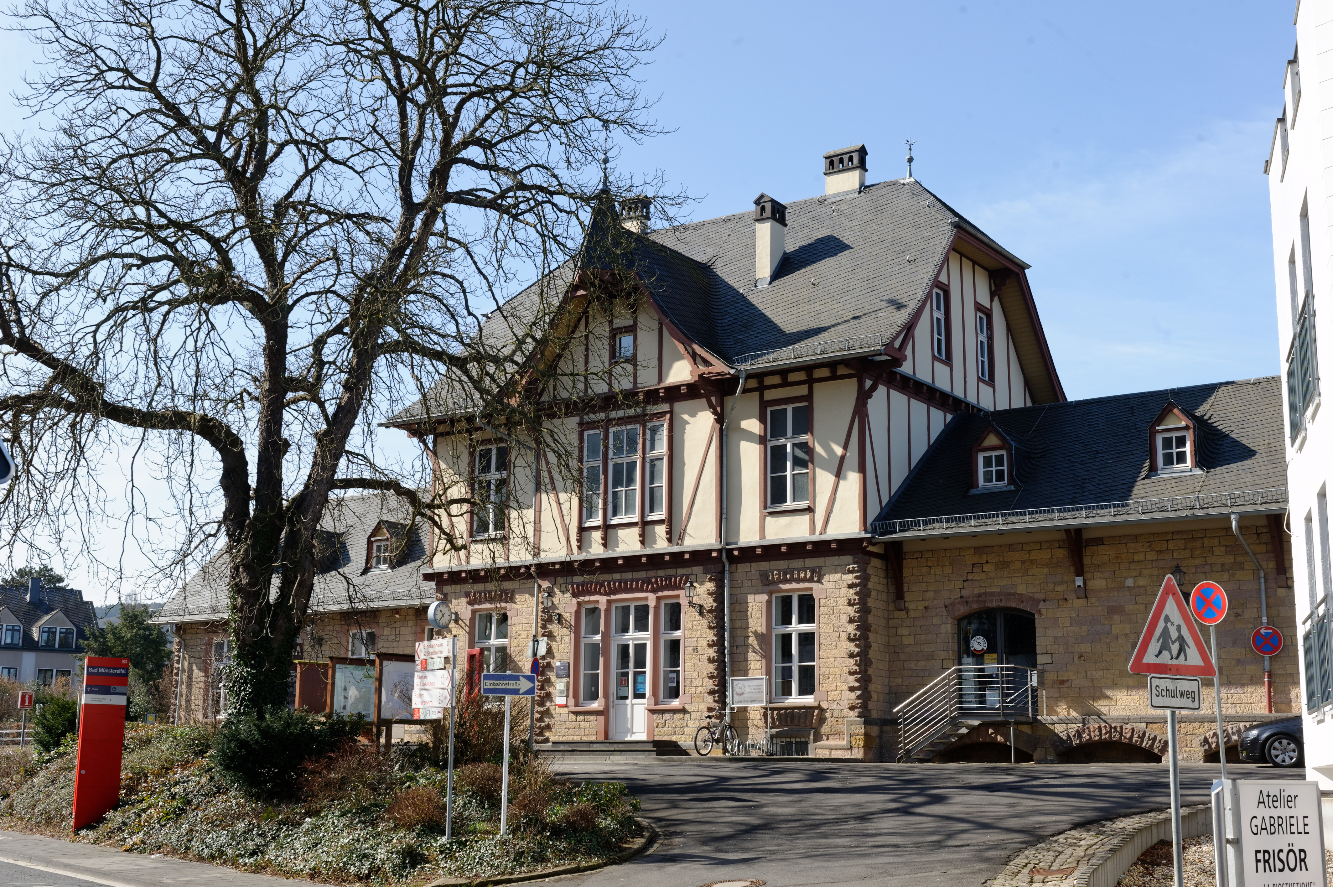 Bahnhof Bad Münstereifel 2016